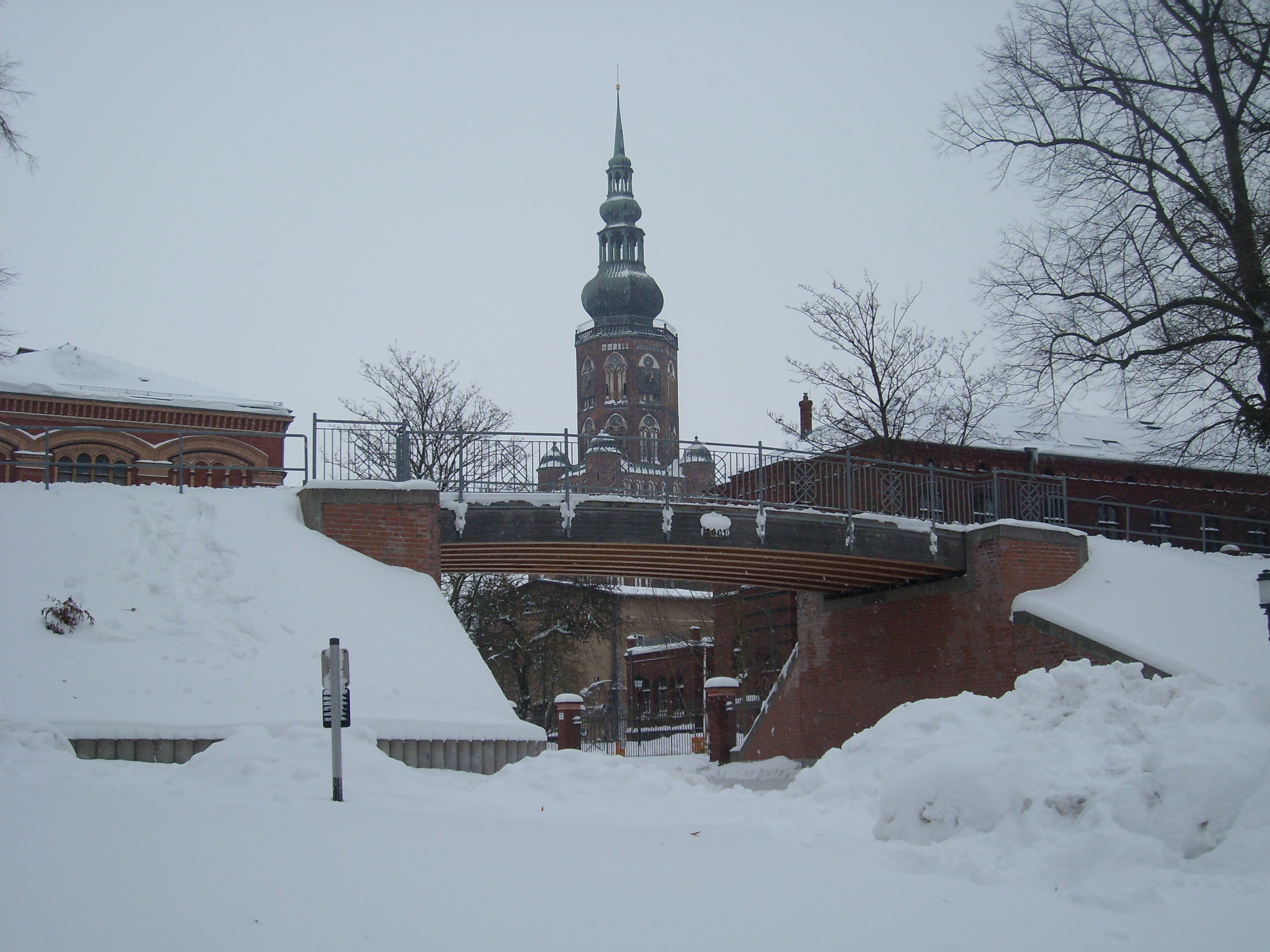 Die 2001 fertiggestellte Wallbrücke über die Rubenowstraße; im Hintergrund der Dom St. Nikolai